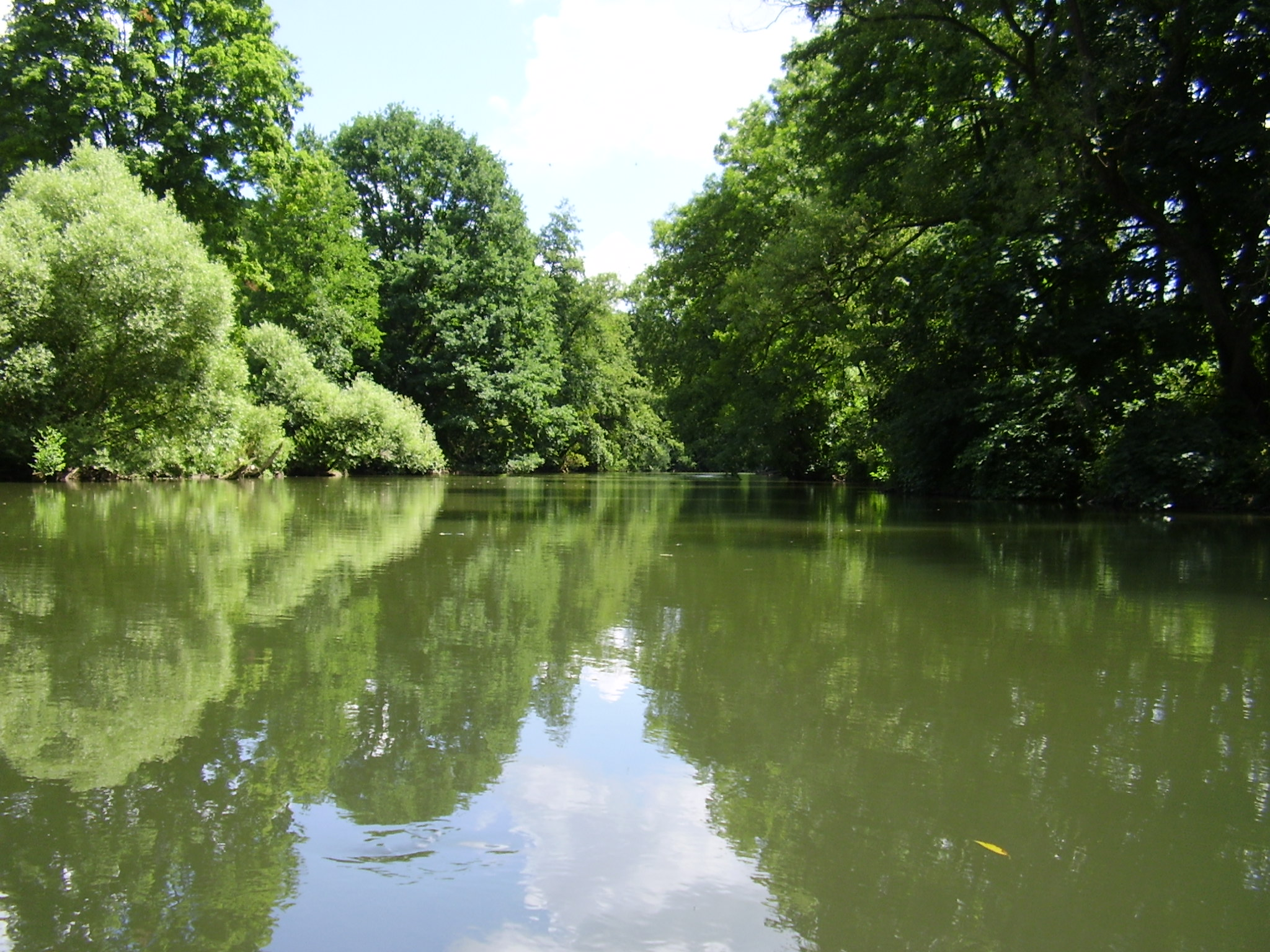 Iaxt flvs.